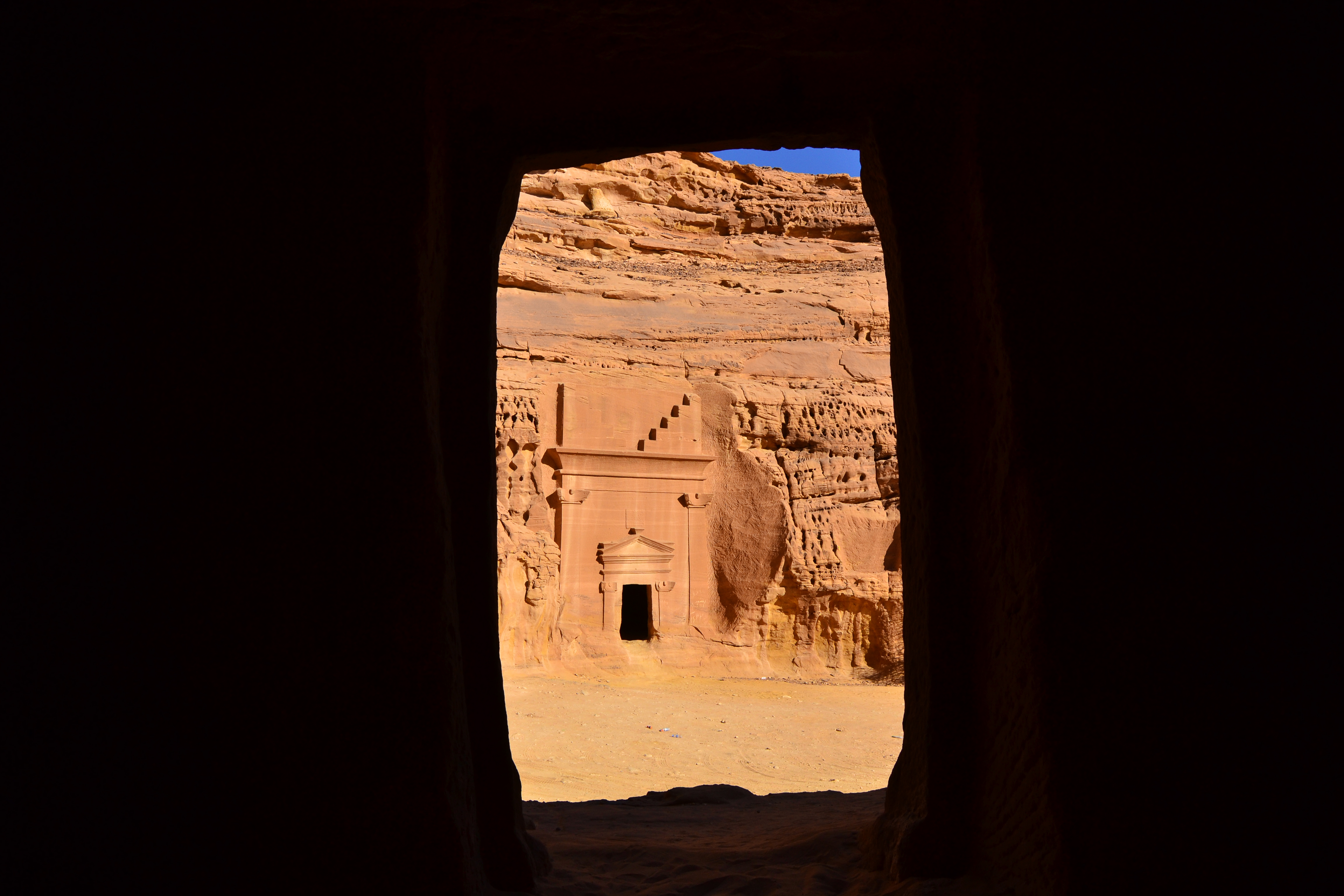 Madain Saleh